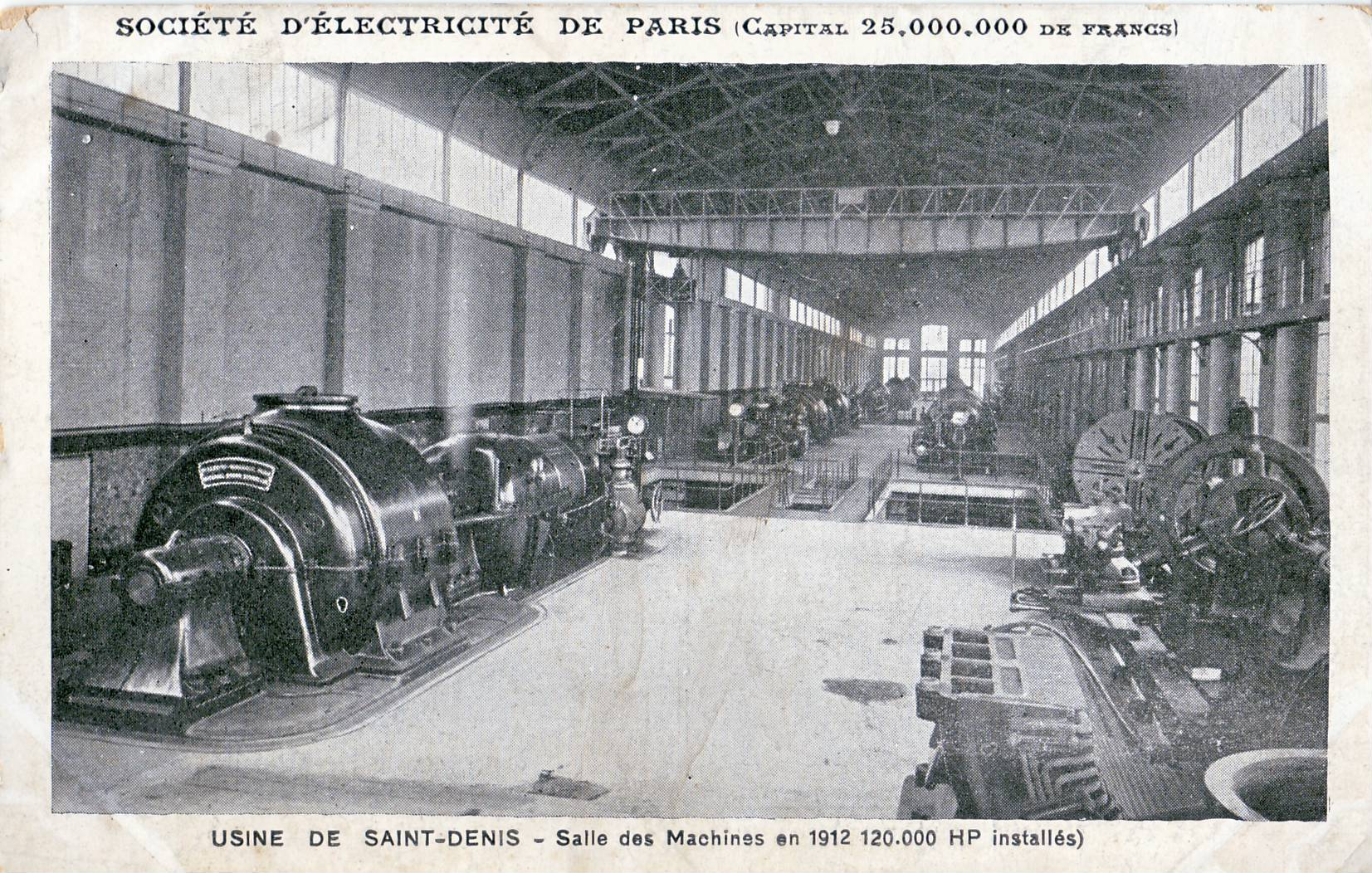 Carte postale ancienne éditée par la Société d'Electricité de Paris montrant la salle des machines de son usine de La Plaine Saint Denis en 1912